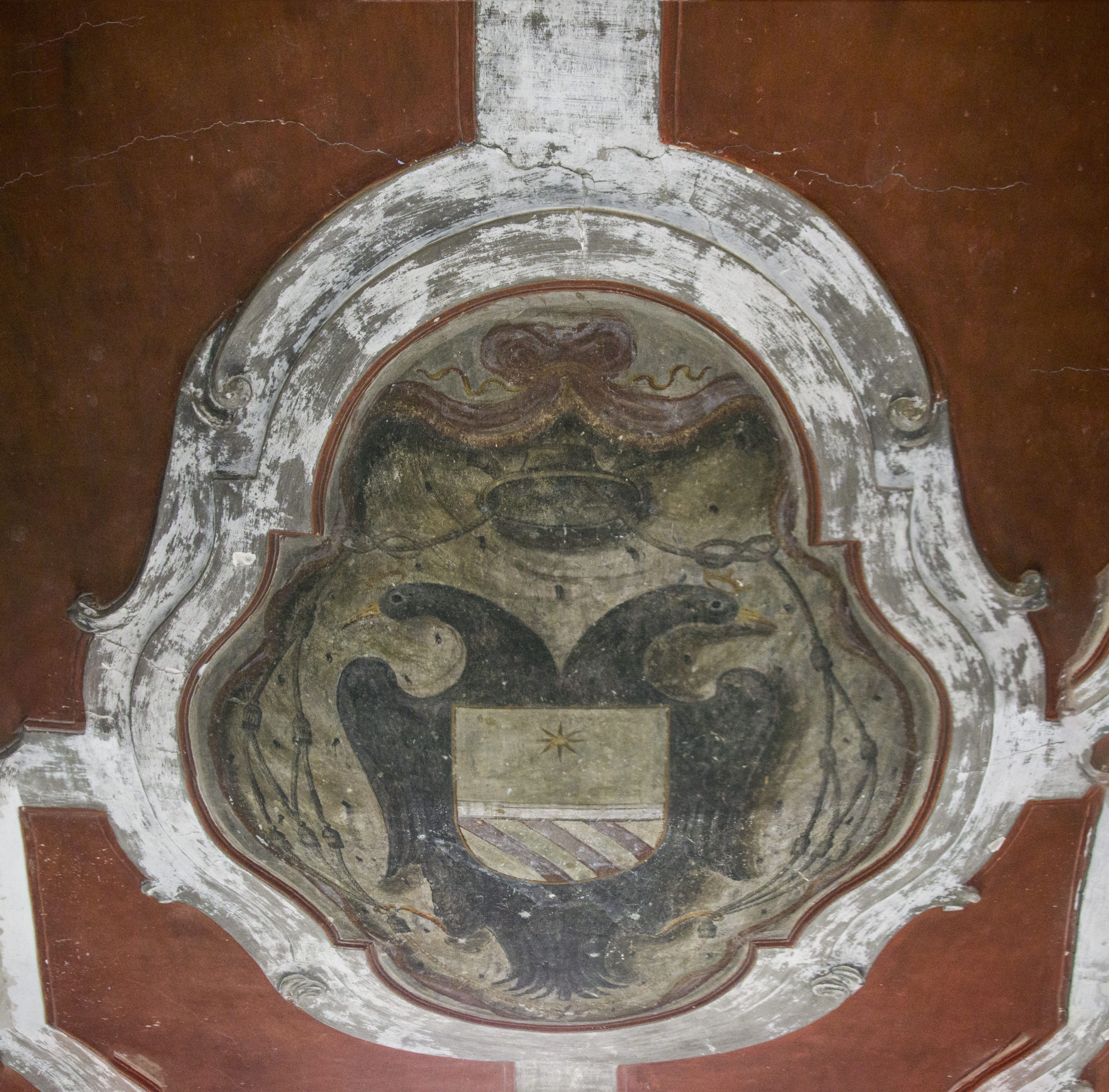 Dettaglio degli interni di palazzo Copeta